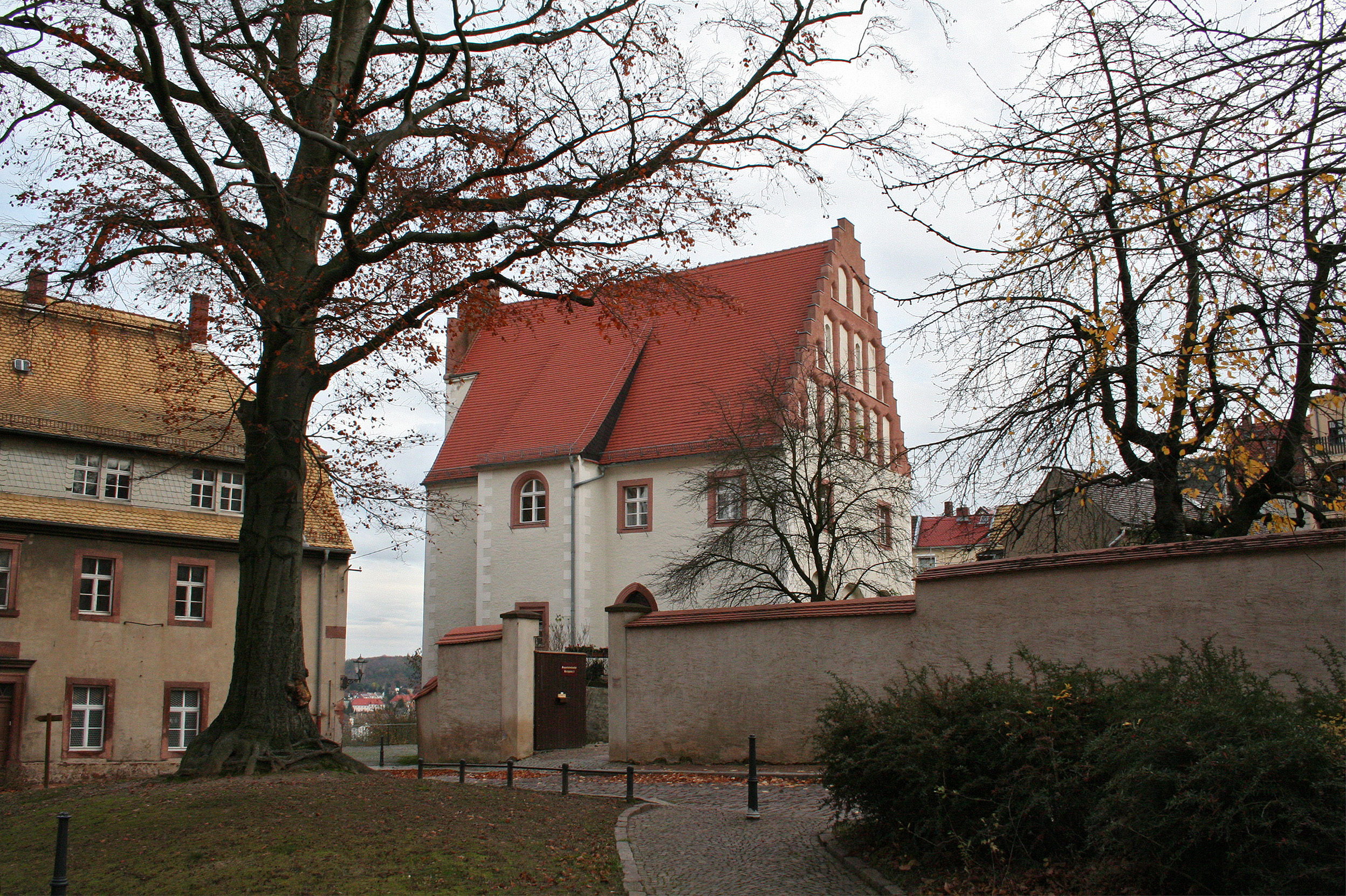 Leisnig, Blick vom Kirchplatz zur Superintendentur